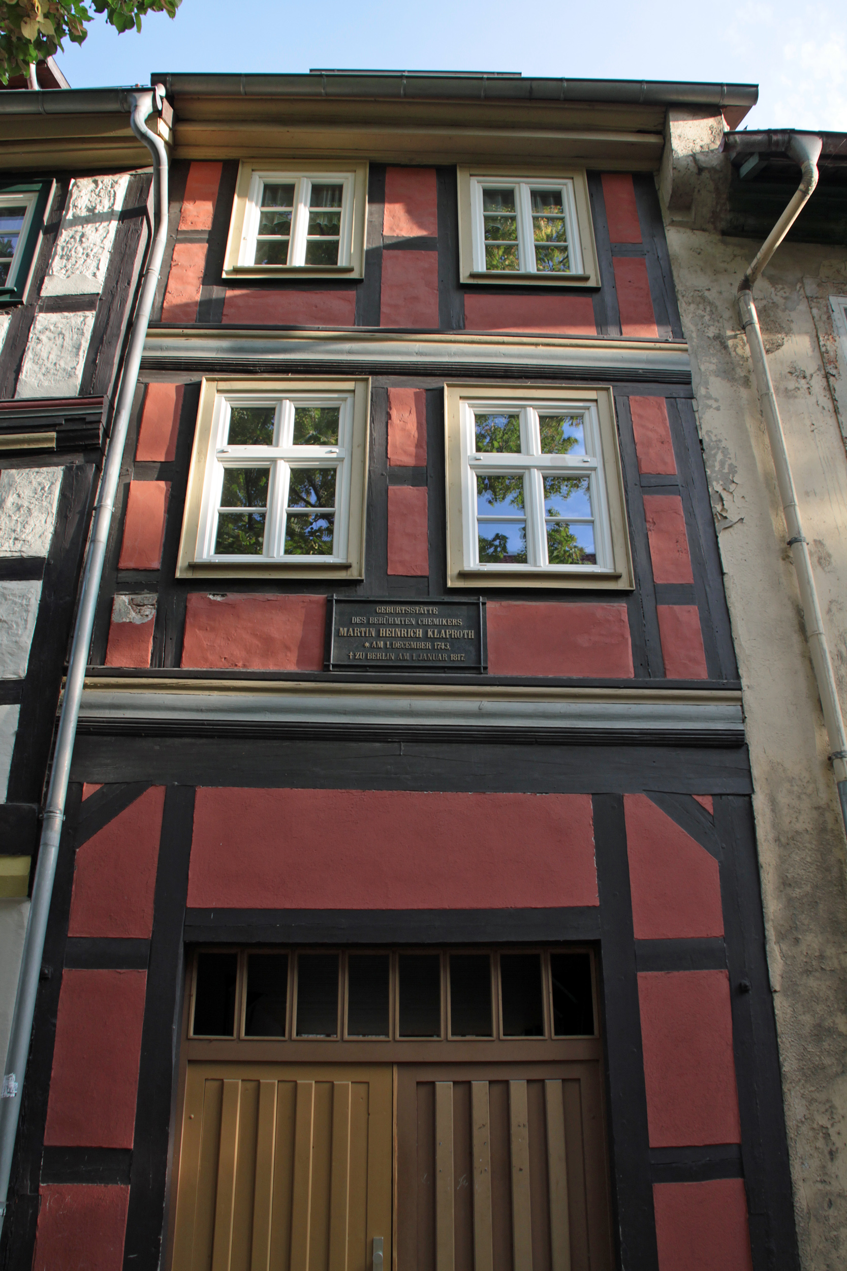 Geburtsstätte des Chemikers Martin Heinrich Klaproth in Wernigerode (Harz).